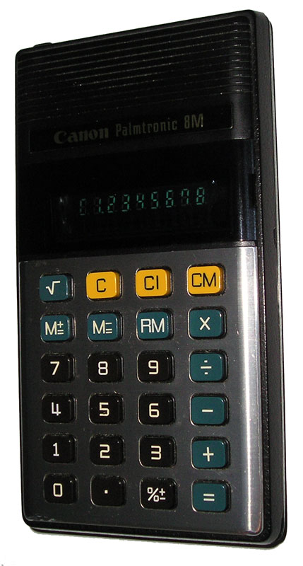 Canon Palmtronic LD-8M 3 - calculator